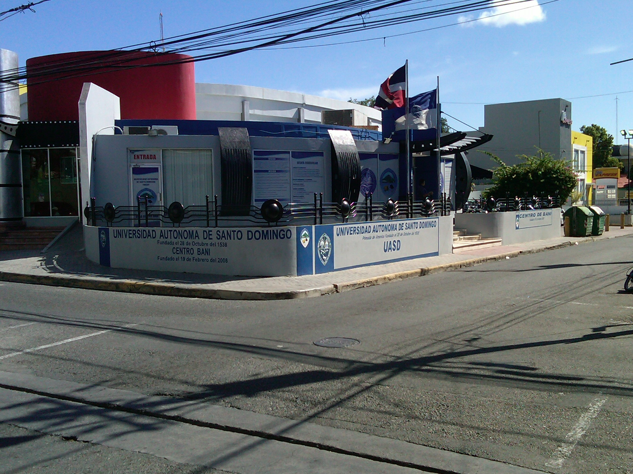 Oficina del Centro Universitario Regional UASD Baní